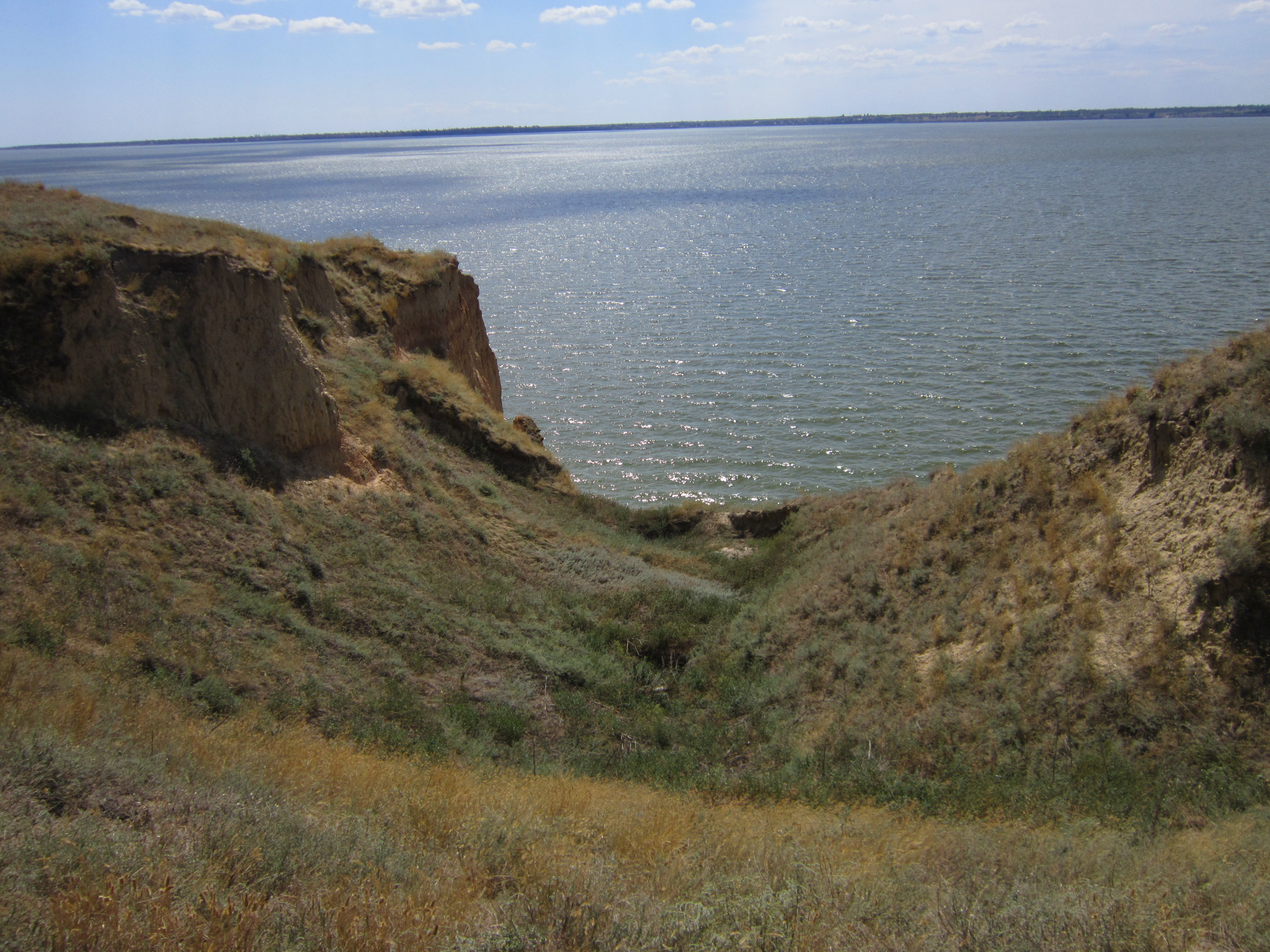 Античне місто Ніконій, село Роксолани, Овідіопольський район, Одеська область